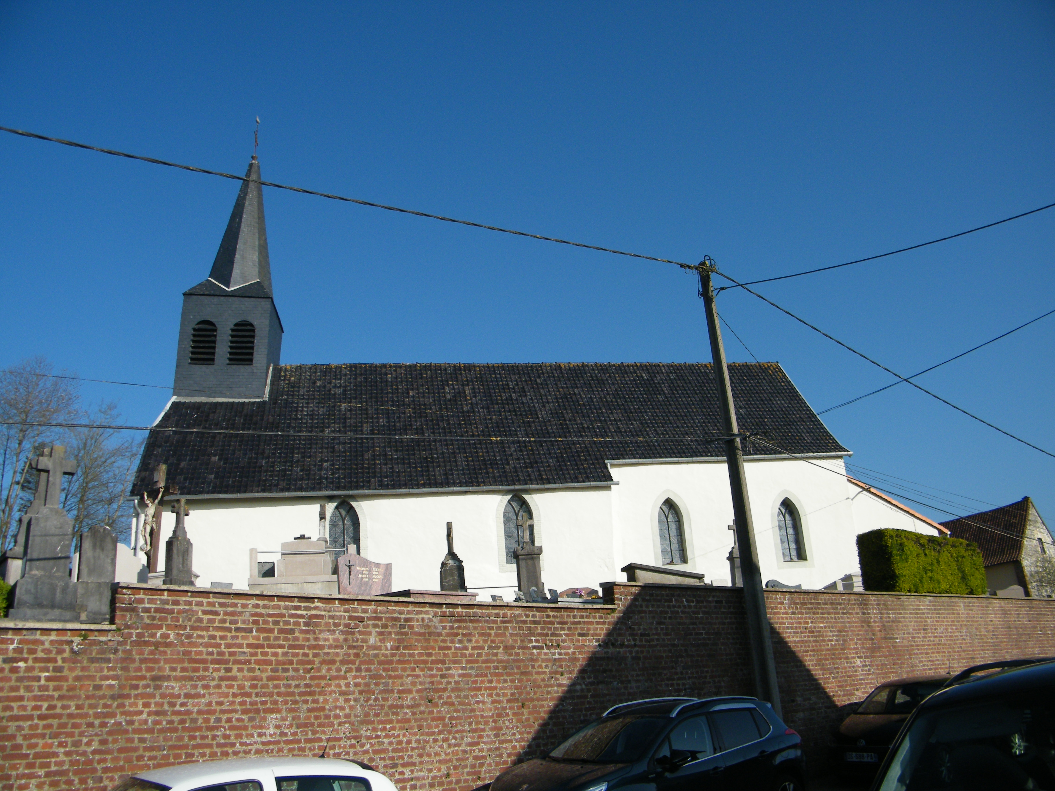 Bezinghem, Pas-de-Calais, Fr, église